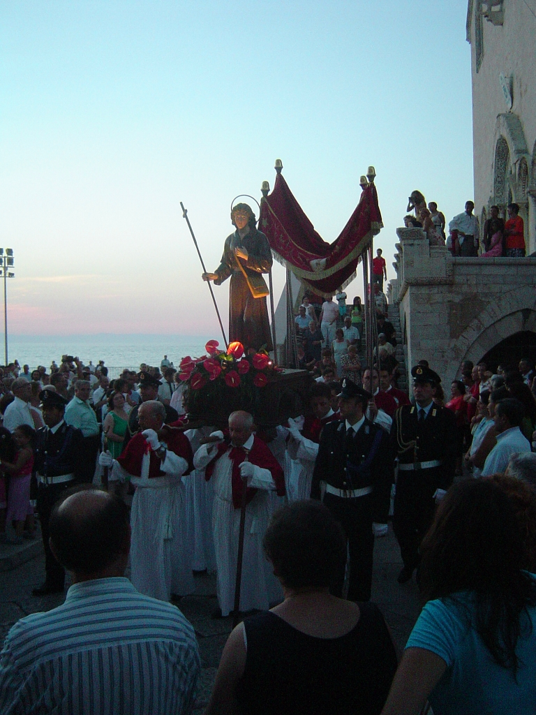 Procession of San Nicola Pellegrino Trani (BA), Italy